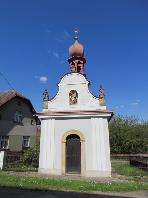 Kaple sv. Jana Nepomuckého ve středu obce Soběslavice